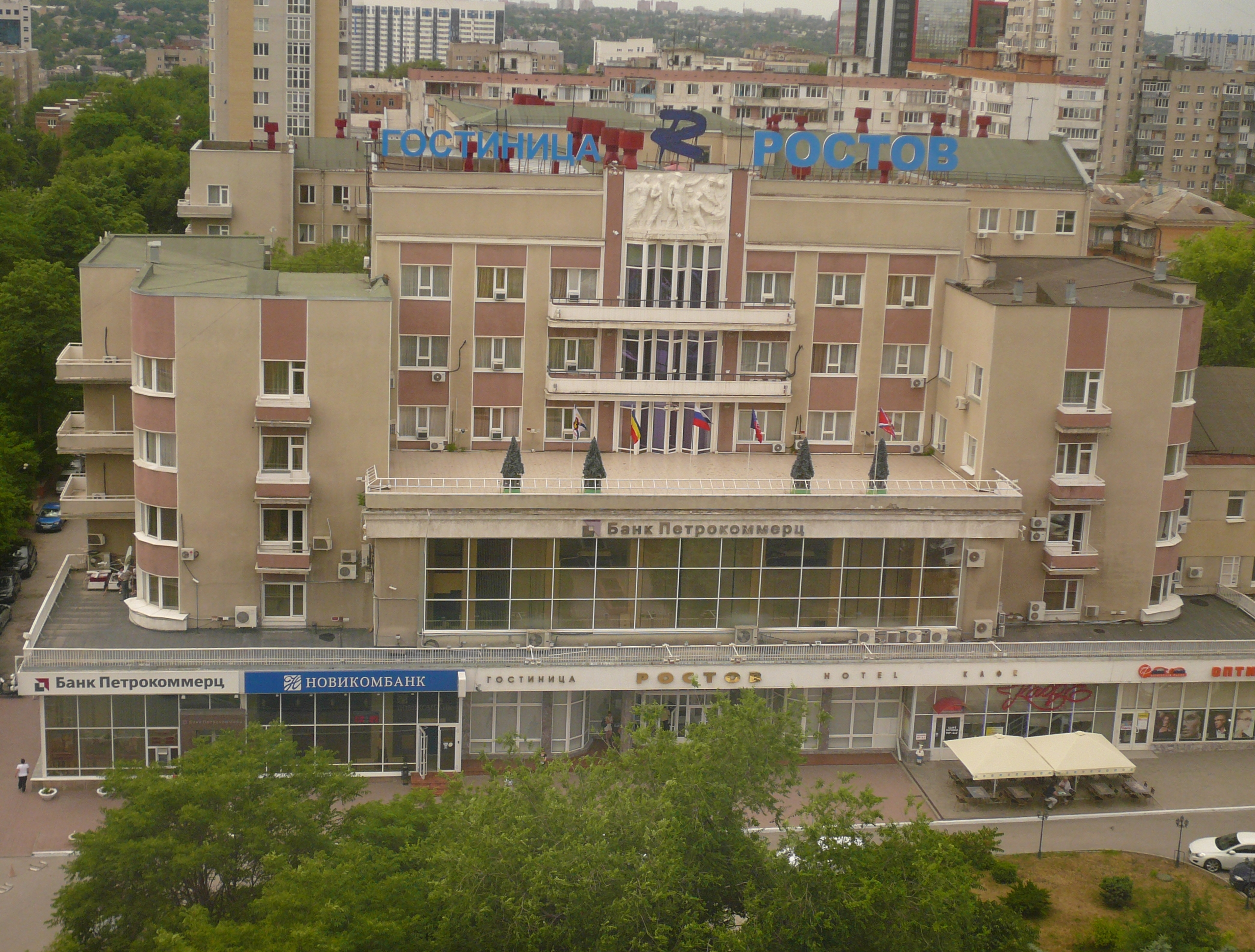 Гостиница "Ростов". Ростов-на-Дону.